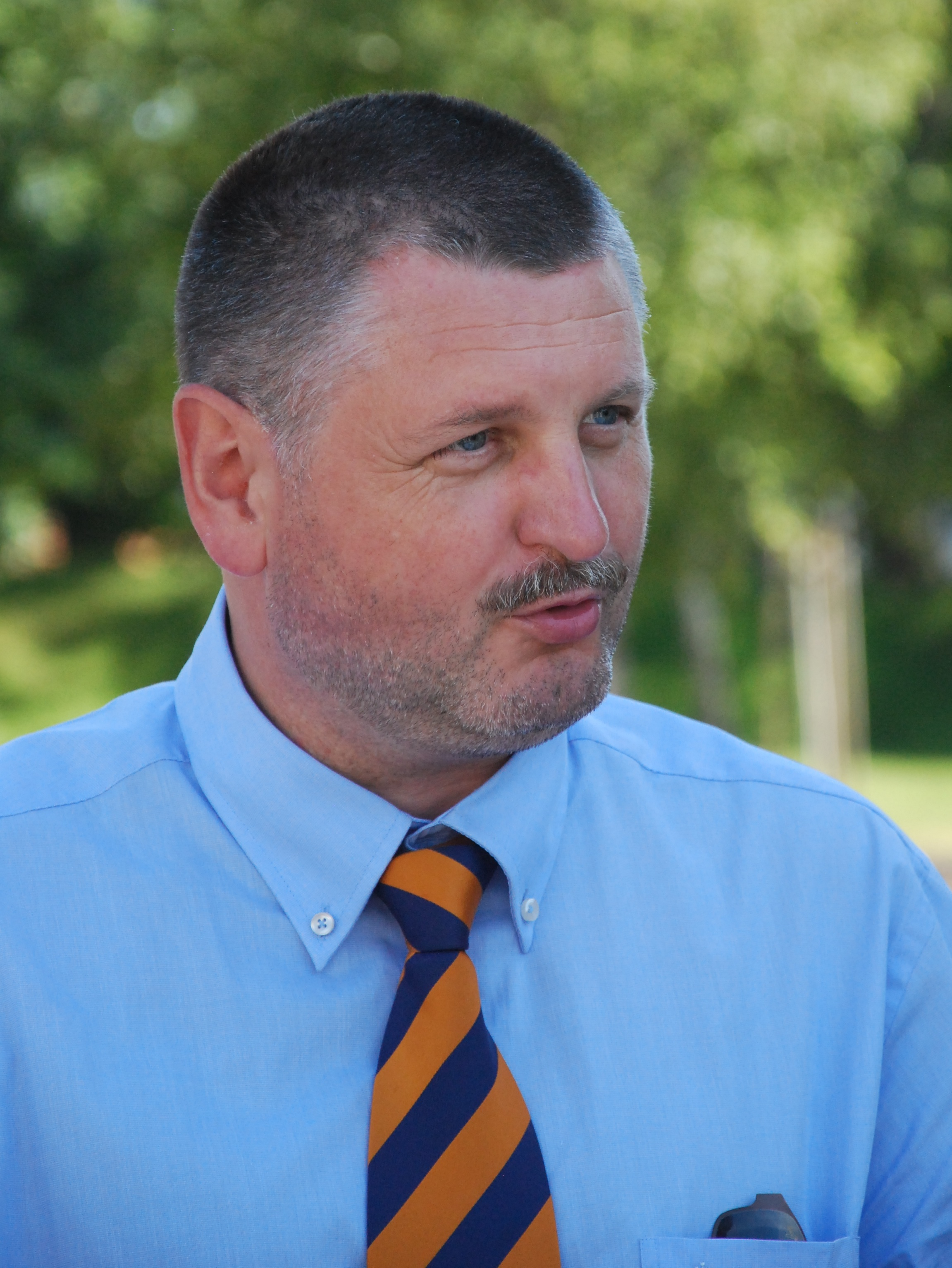 Uwe Schulze, Landrat des Landkreises Anhalt-Bitterfeld, im Juni 2010 bei der Freigabe der Kreisstraße K 2055, Thalheimer Straße, im Ortsteil Wolfen der Stadt Bitterfeld-Wolfen.